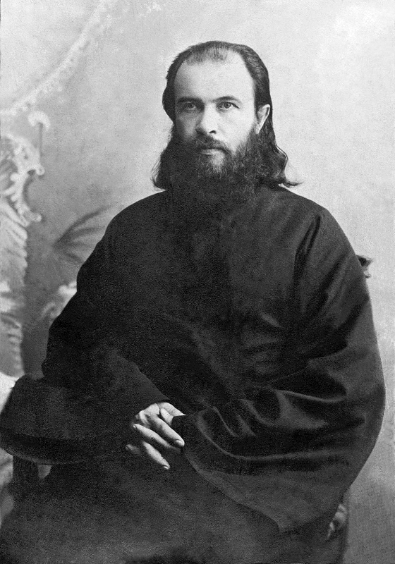 Павел Михайлович Светозаров (1867 - 1922)